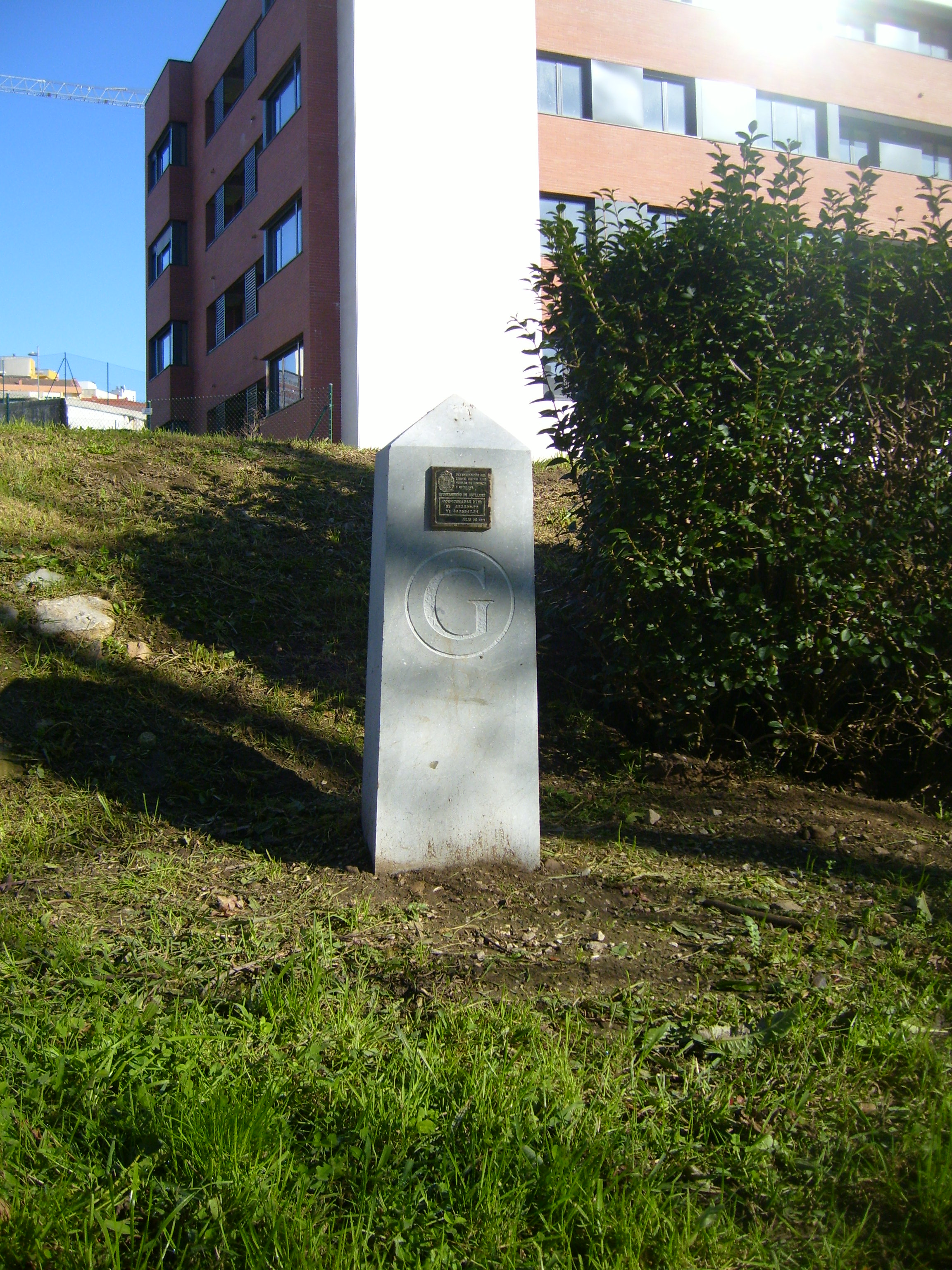 Uno de los siete mojones que marcan los límites entre Guarnizo y El Astillero; se encuentra situado junto al parque de La Habanera